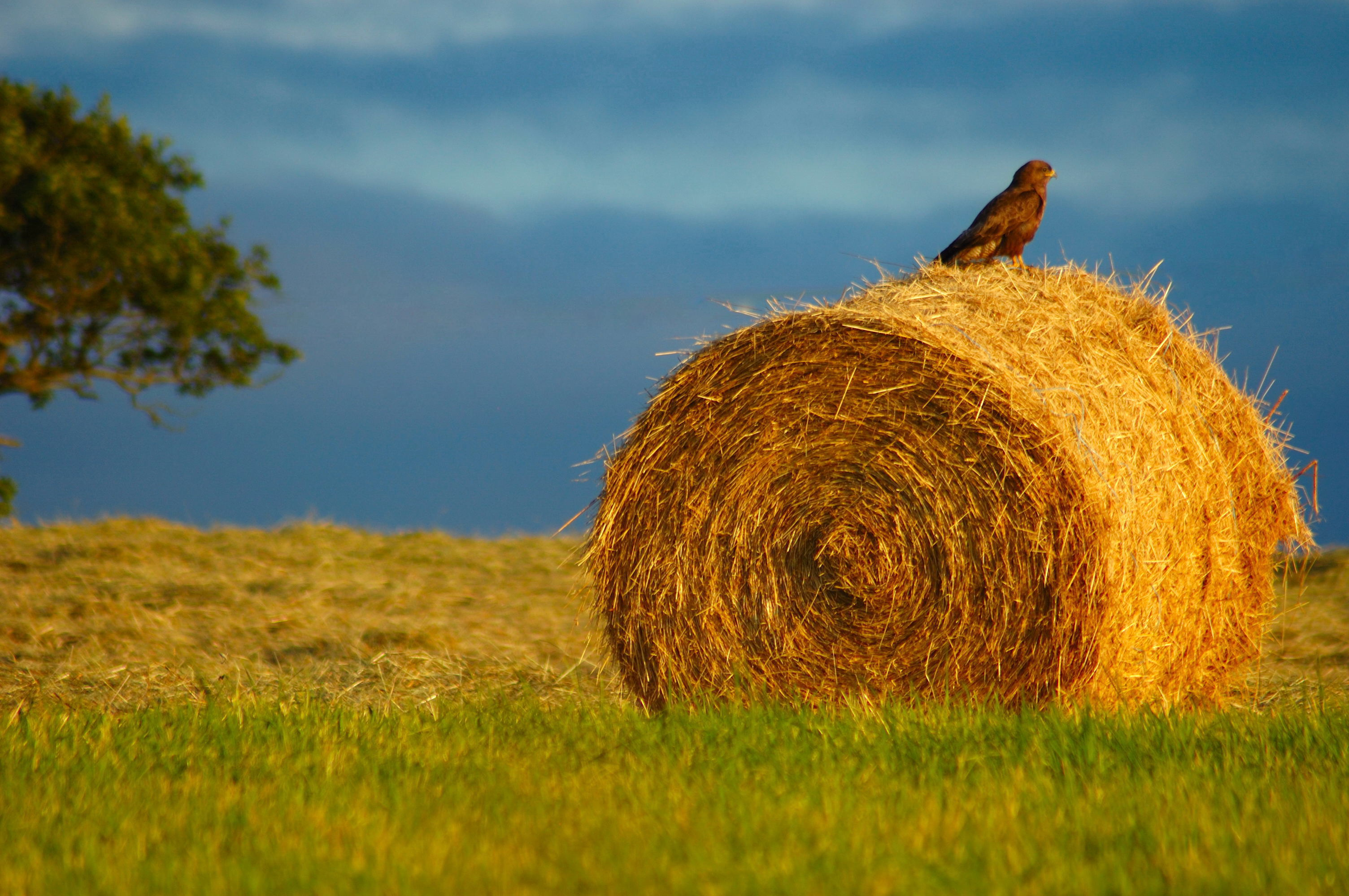 Normandie Pierrefitte en Cinglais Calvados